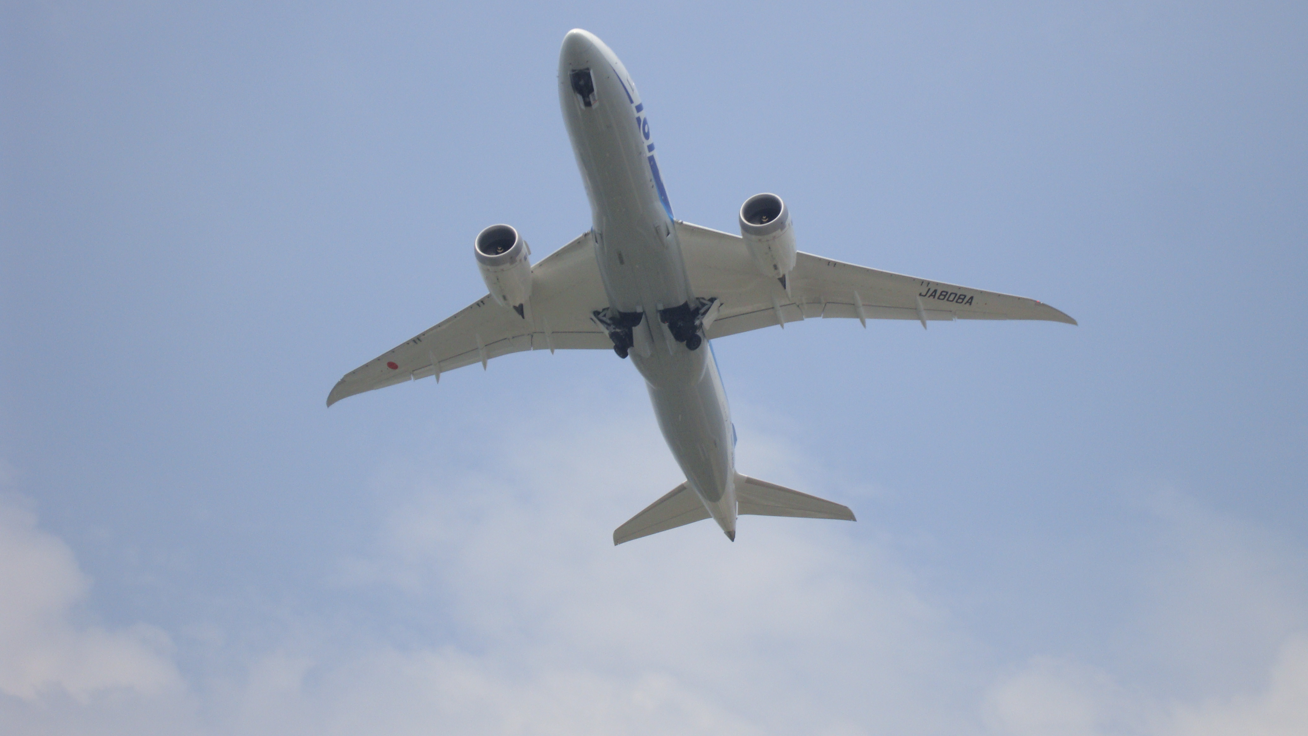 即將通過濱江街180巷上空的全日空波音787，可見下方構造。